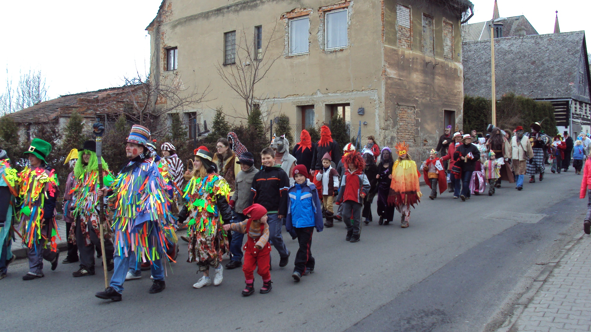 Česky: Karnevalový průvod masek